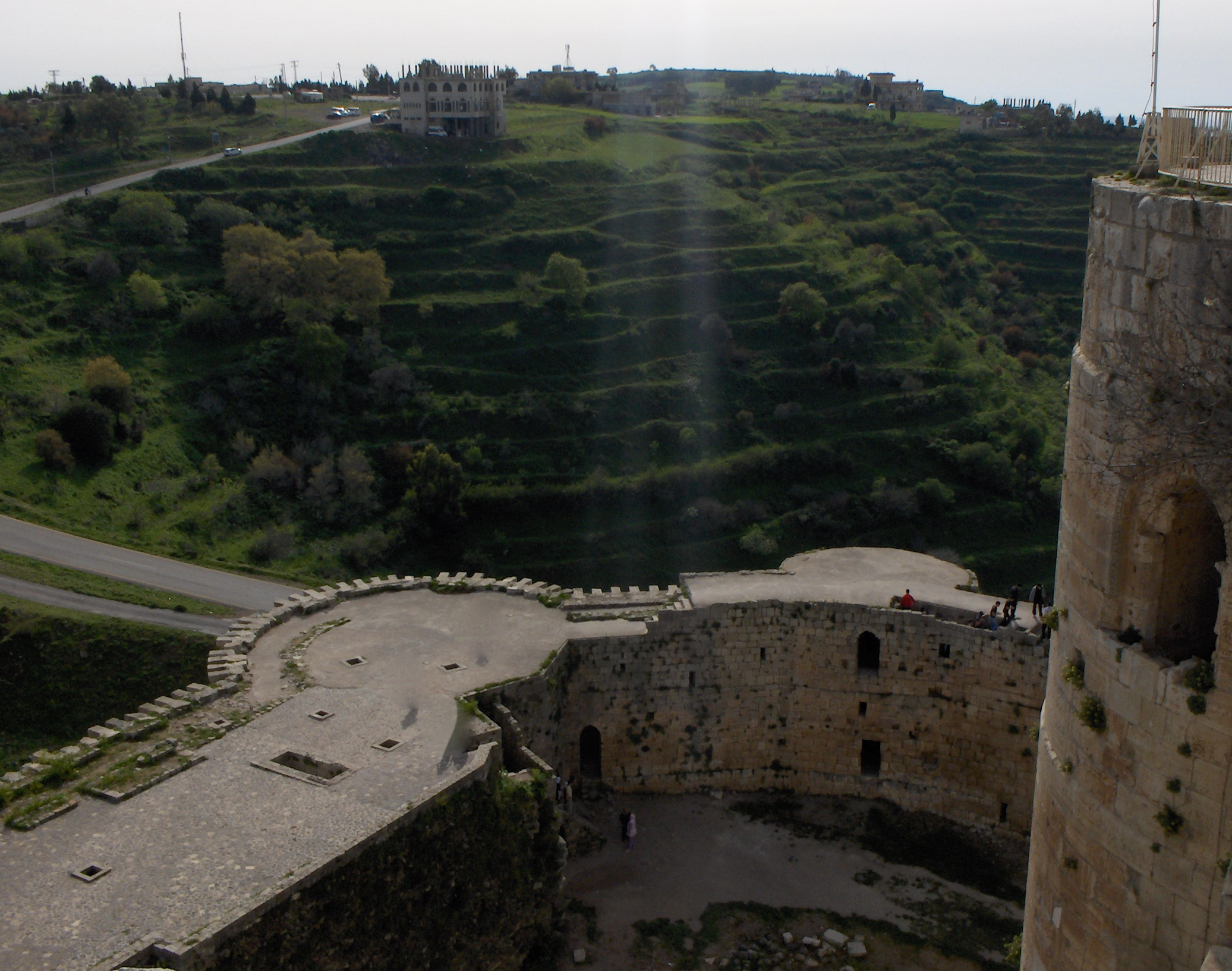 Panorama dalla Torre di Monfret (il maschio) del Krak dei Cavalieri